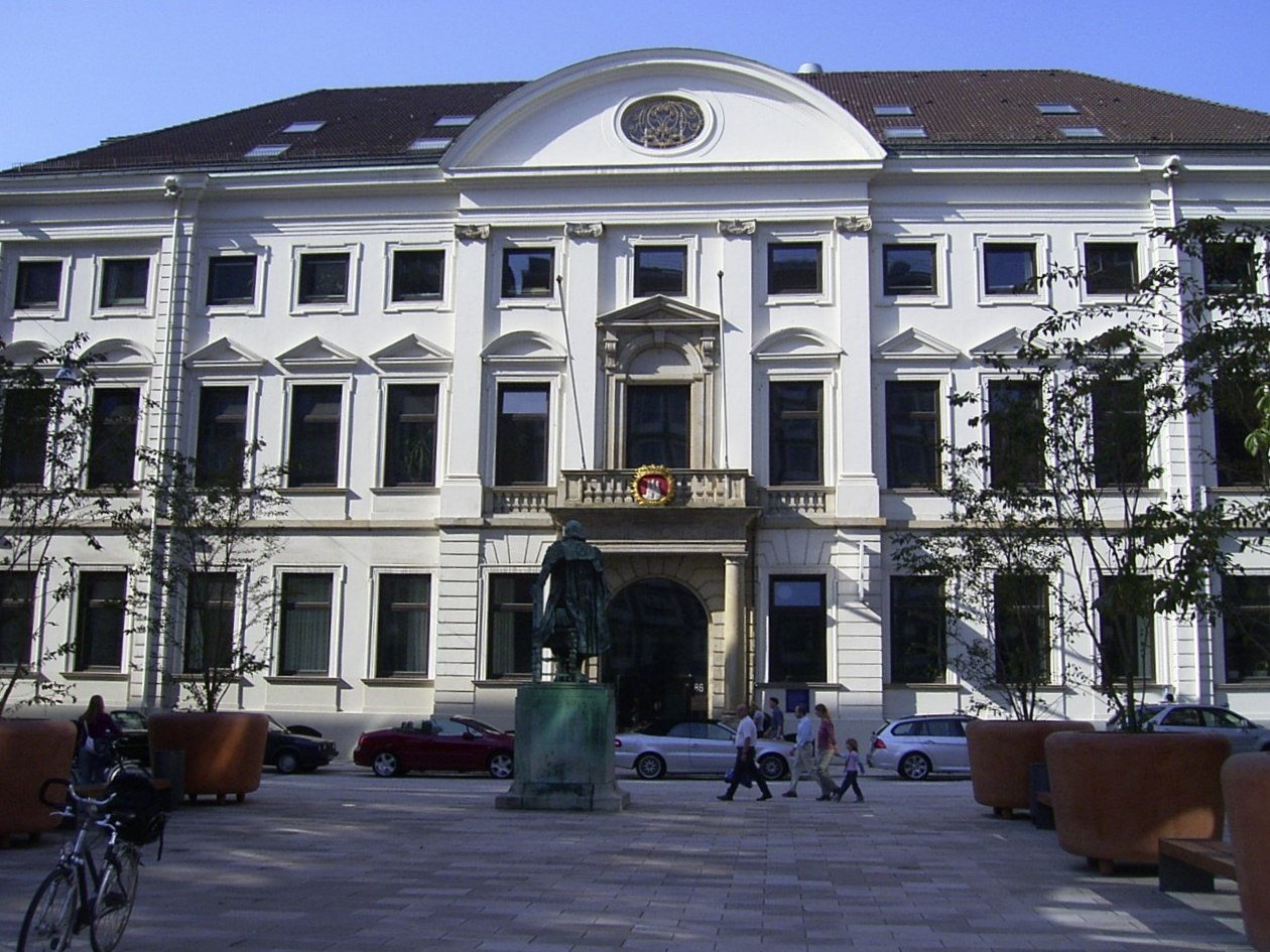 Görtzsches Palais in Hamburg-Neustadt This is a photograph of an architectural monument.